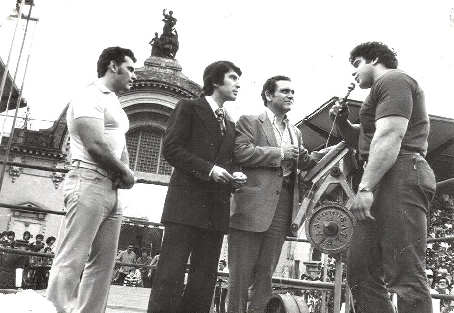 Lou Ferrigno junto a Jorge Bocacci y el Vasco Guipúzcoa (Titanes en el Ring)